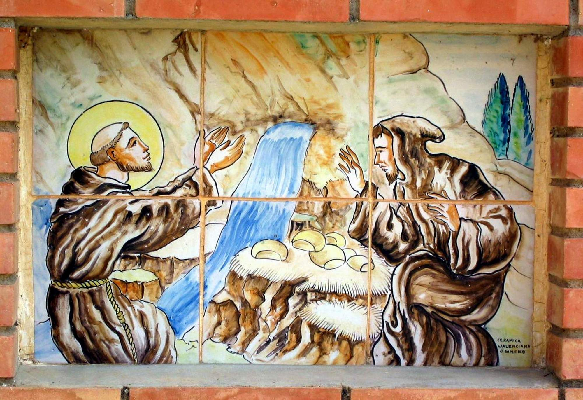 Plafón cerámico representando a San Francisco de Asís en la mesa-altar del Vía Crucis de Casasaltas (Valencia).